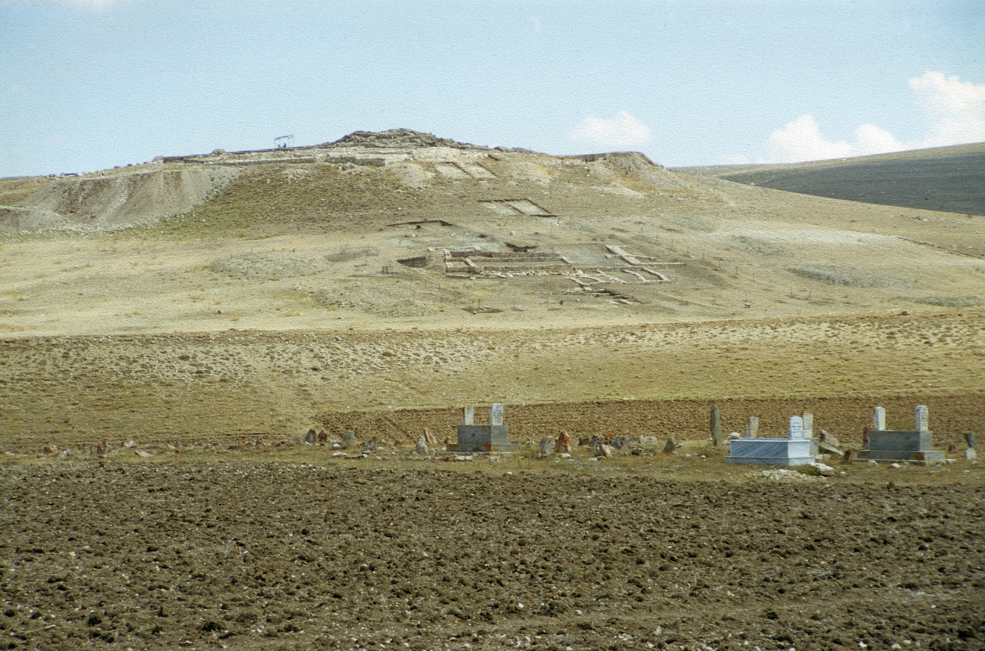 Siedlungshügel Kuşaklı-Sarissa, Zentraltürkei